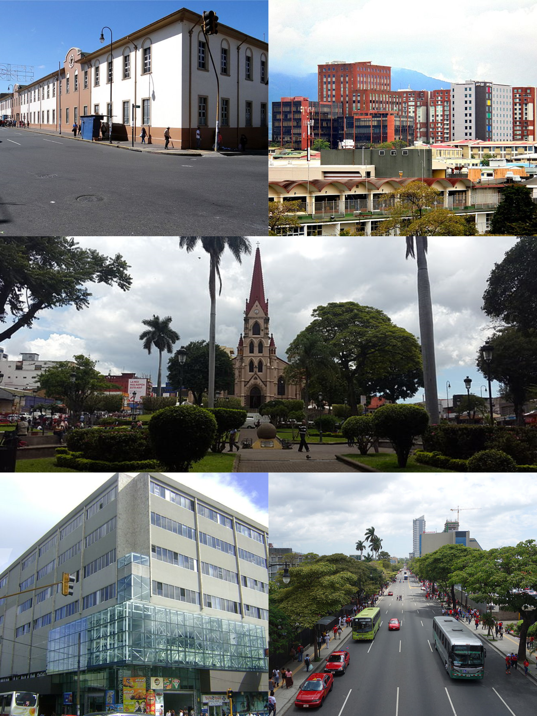 Fotomontaje del distrito Hospital de la ciudad de San José